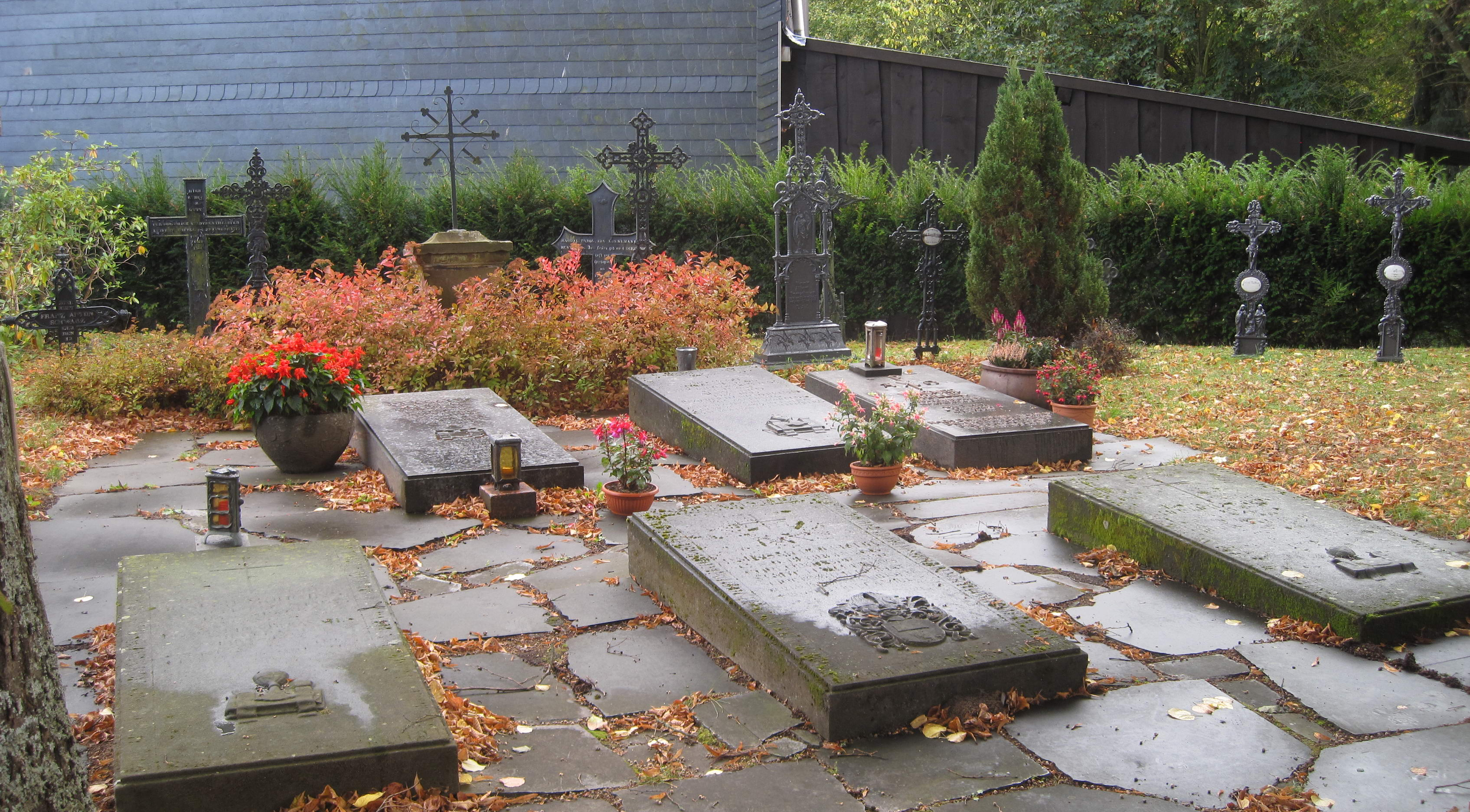 Teil des Friedhofs an der Wallfahrtskirche Mariä Himmelfahrt, auch Unterkirche genannt, in Hallenberg. Hier wurden und werden Pfarrer aus Hallenberg begraben. Das Bild zeigt auch alte Grabkreuze von anderen Friedhöfen aus Hallenberg.